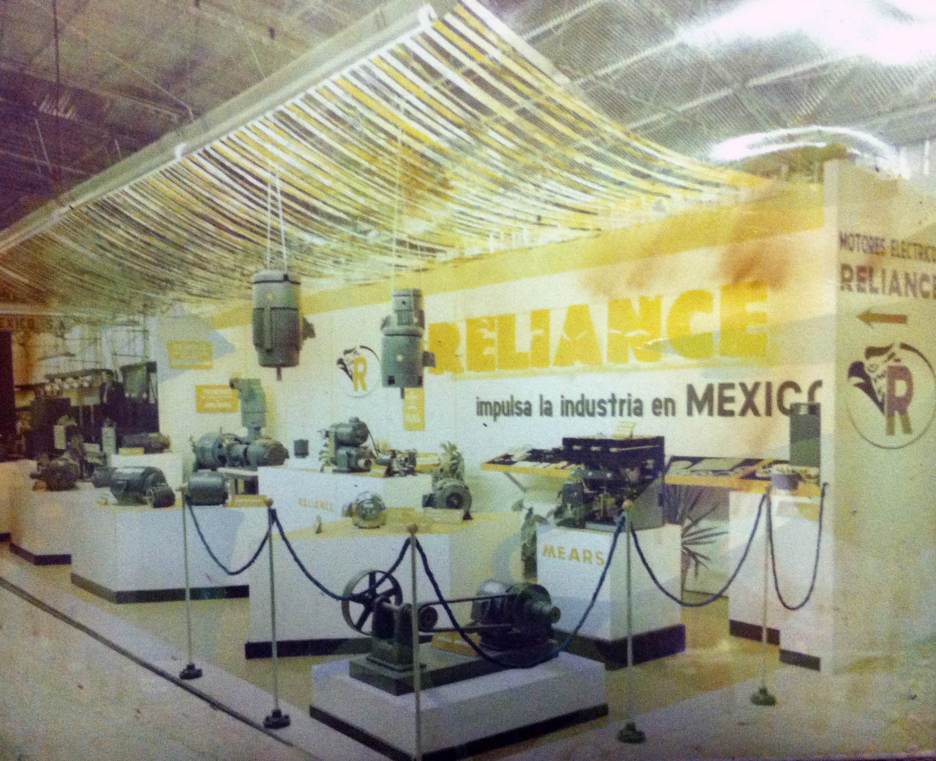 Primera exposición de Reliance de México, S.A. Fuente: Potencia Industrial, S.A.